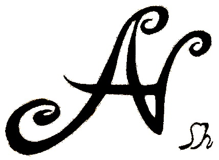 طرح شریعتی-شاندل کار خود دکتر شریعتی